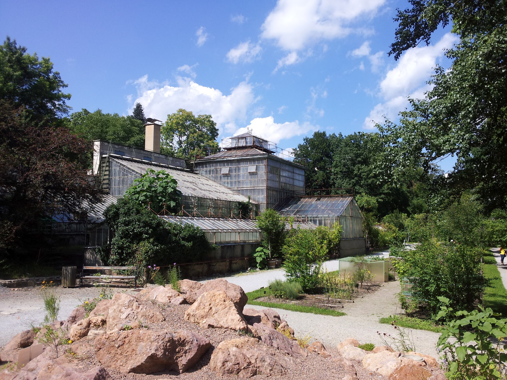 Glashaus, Gewächshausanlage im Botanischen Garten der Karl-Franzens-Universität